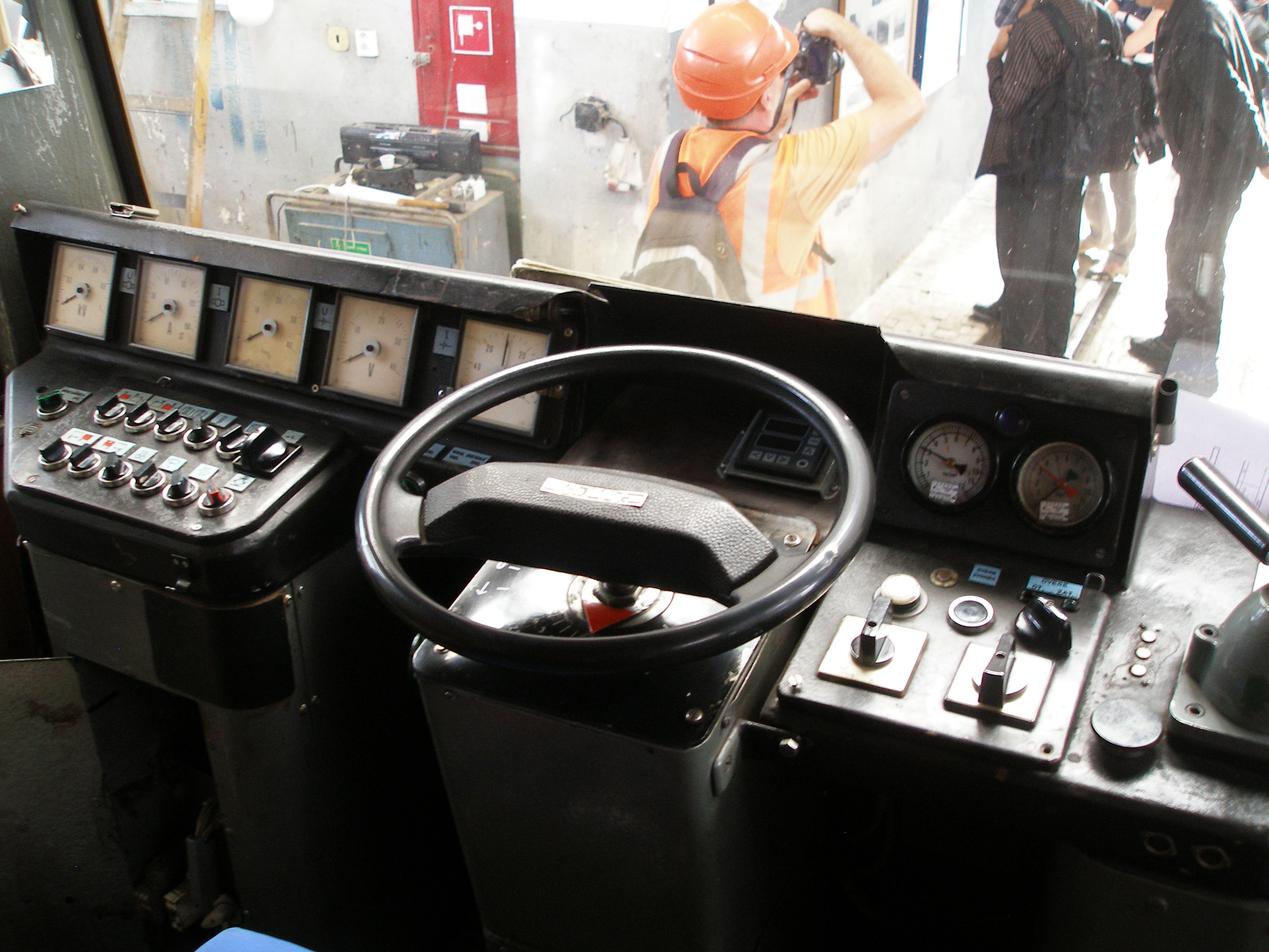 Řidicí pult elektrická jednotka v depu Trenčianské elektrické železnice v Trenčianské Teplé.